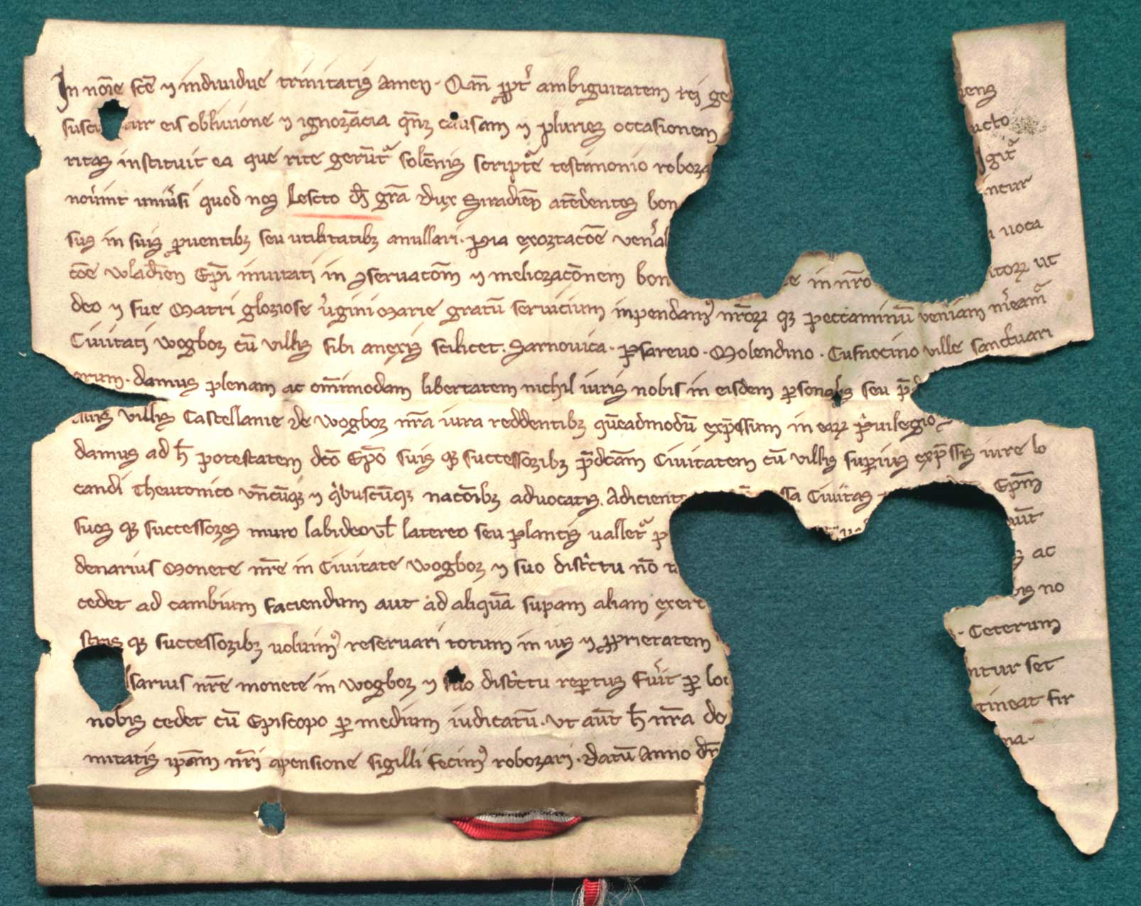 Leszek, ks. sieradzki, wystawia przywilej na lokację na prawie niemieckim m. Wolborza i wsi w jego okręgu. Język: łac. Opis zewnętrzny: oryg., 1 k. pergaminowa, 19 x 14 + 2,1 cm; pieczęć na współczesnej taśmie; dziury zajmujące ok. 1/3 tekstu dokumentu